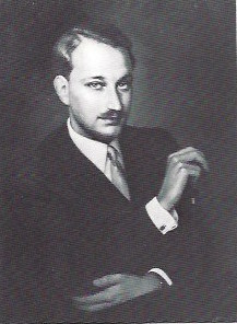 Fotographie eines Ölgemäldes von Peter Fuld